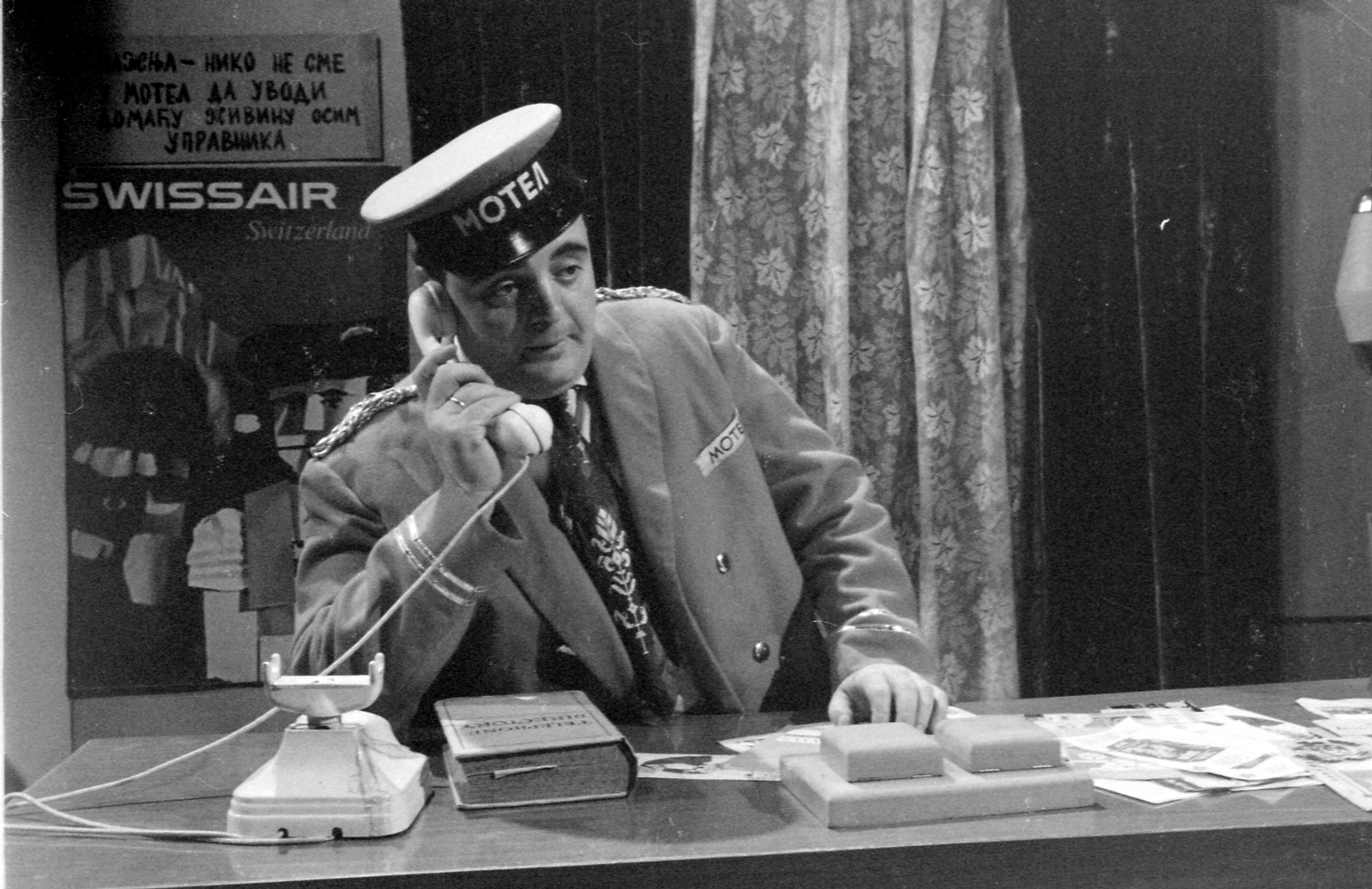 Taško Načić (1934-1993)srpski glumac.Foto:Stevan Kragujević (po odobrenju kćerke Tanje Kragujević)